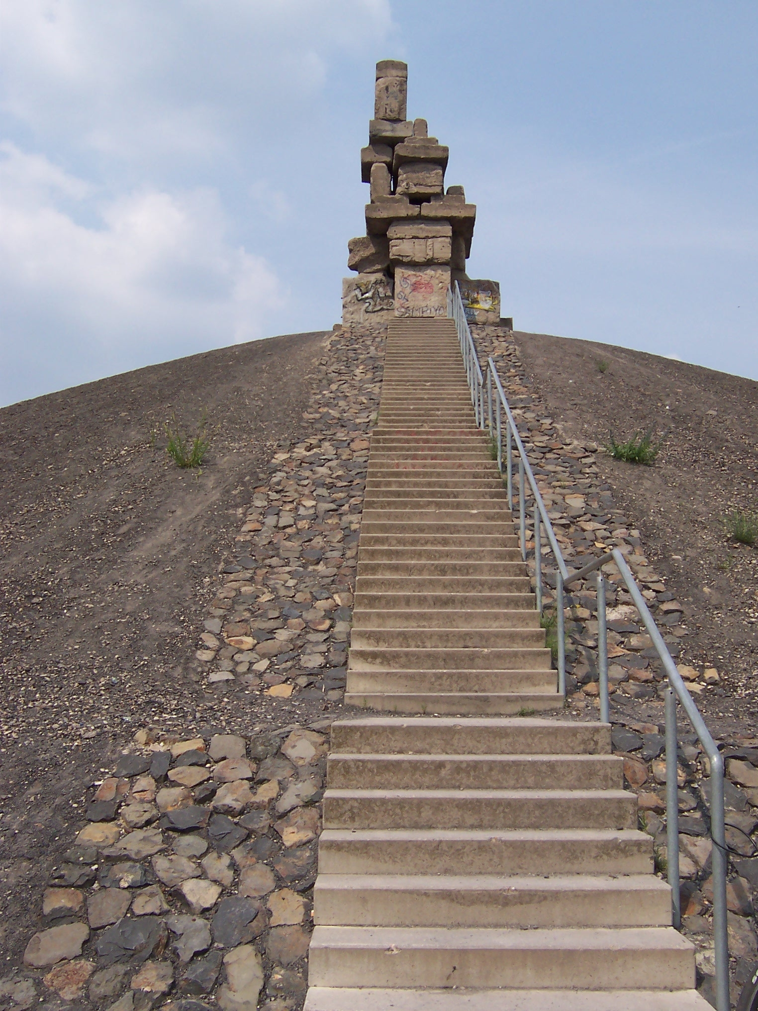 Die Himmelstreppe der Halde Rheinelbe in Gelsenkirchen-Ückendorf